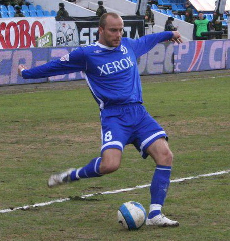 Dmitri Khokhlov